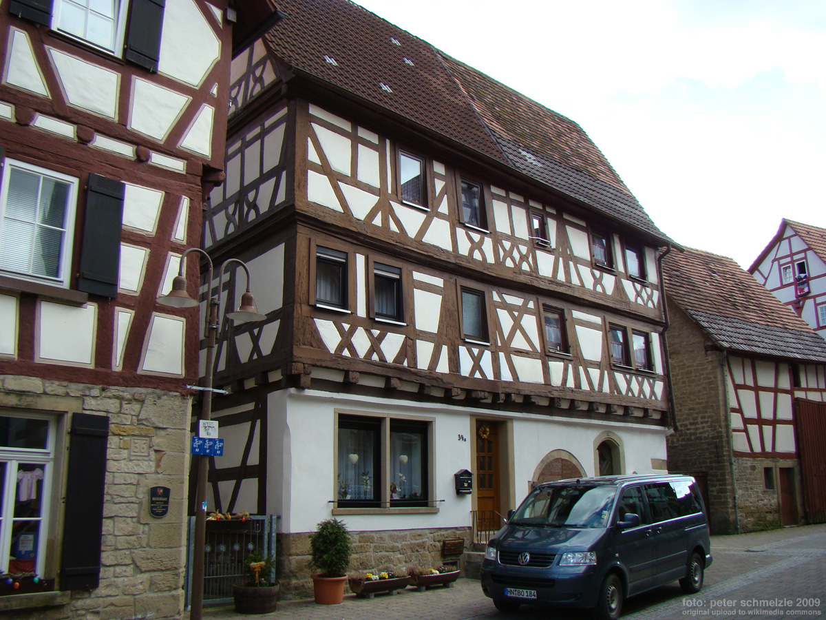 Historisches Gebäude Altstadtstraße 34a in Eppingen